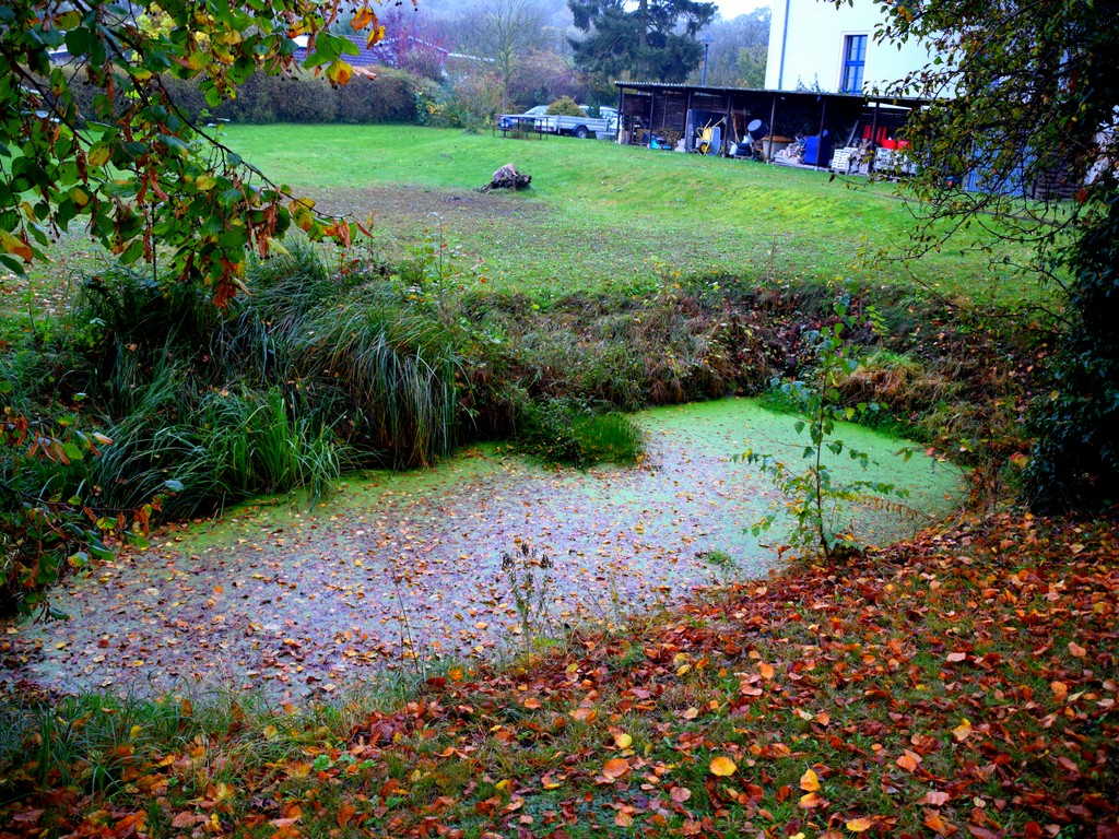 Teich an der Hauptstraße in Frankfurt (Oder)-Rosengarten